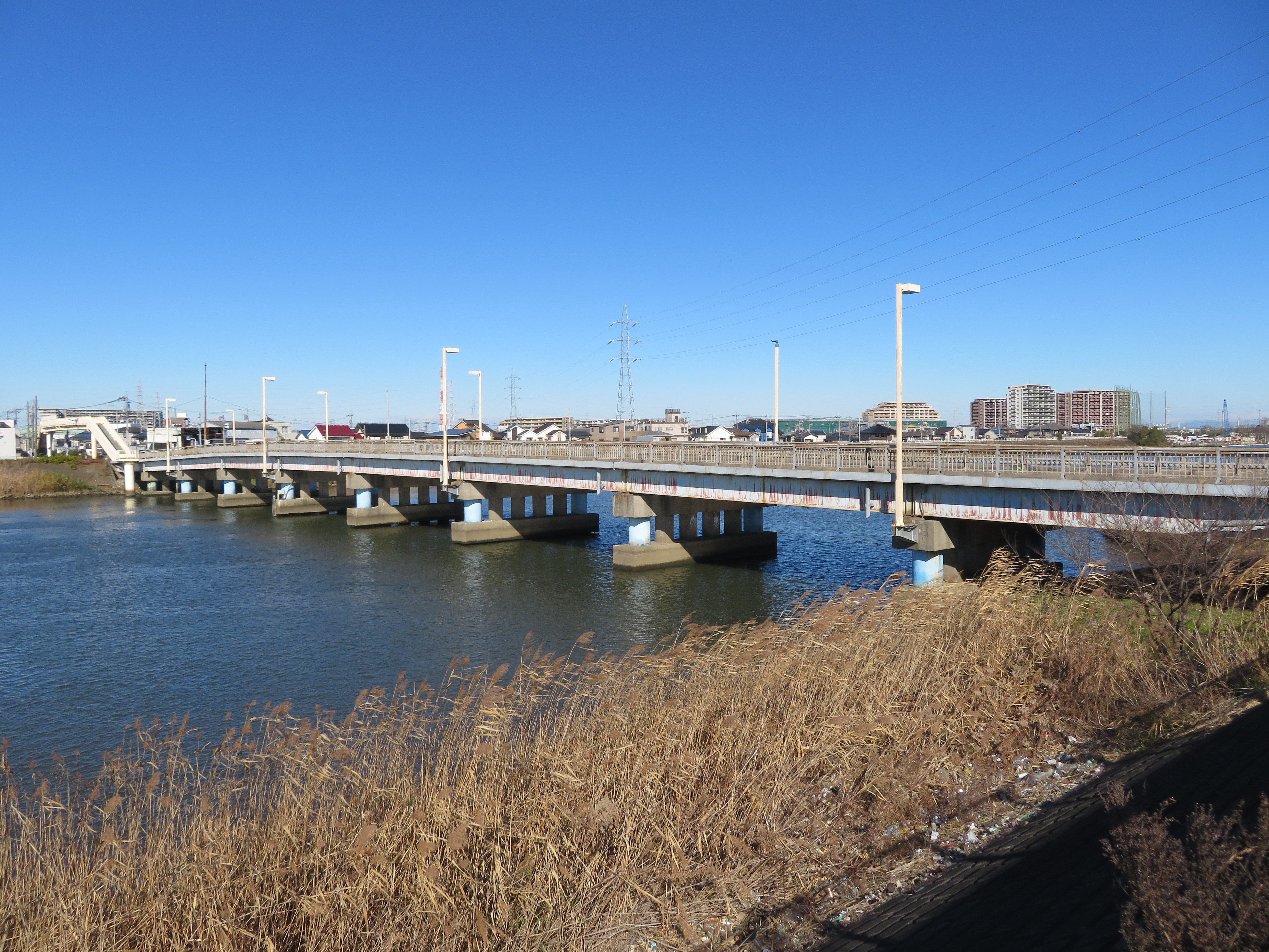 埼玉県八潮市の中川に架かる潮止橋（左岸下流側から撮影） Canon PowerShot SX720 HS